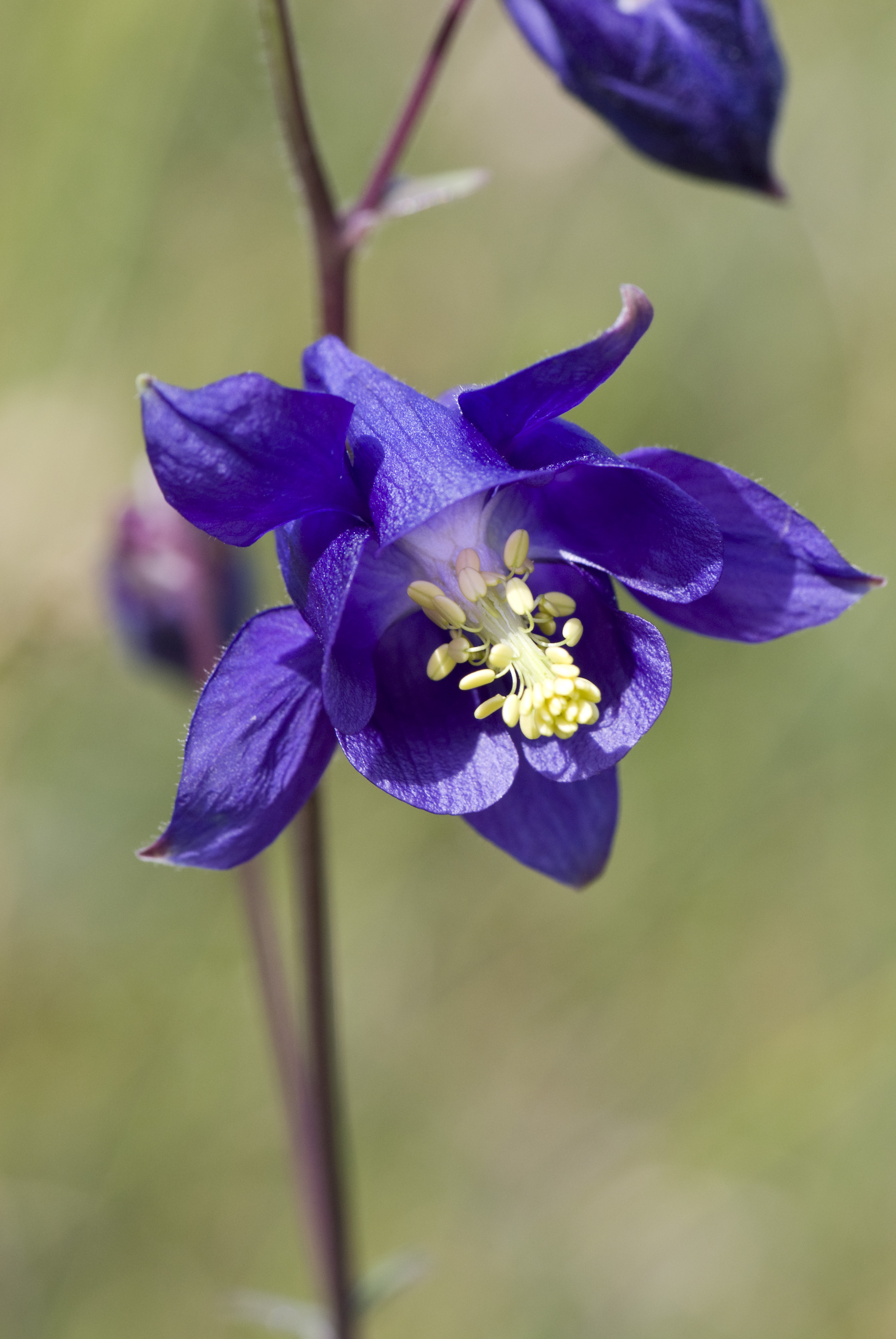 Aquilegia vulgaris Chauvoncourt (Meuse), France